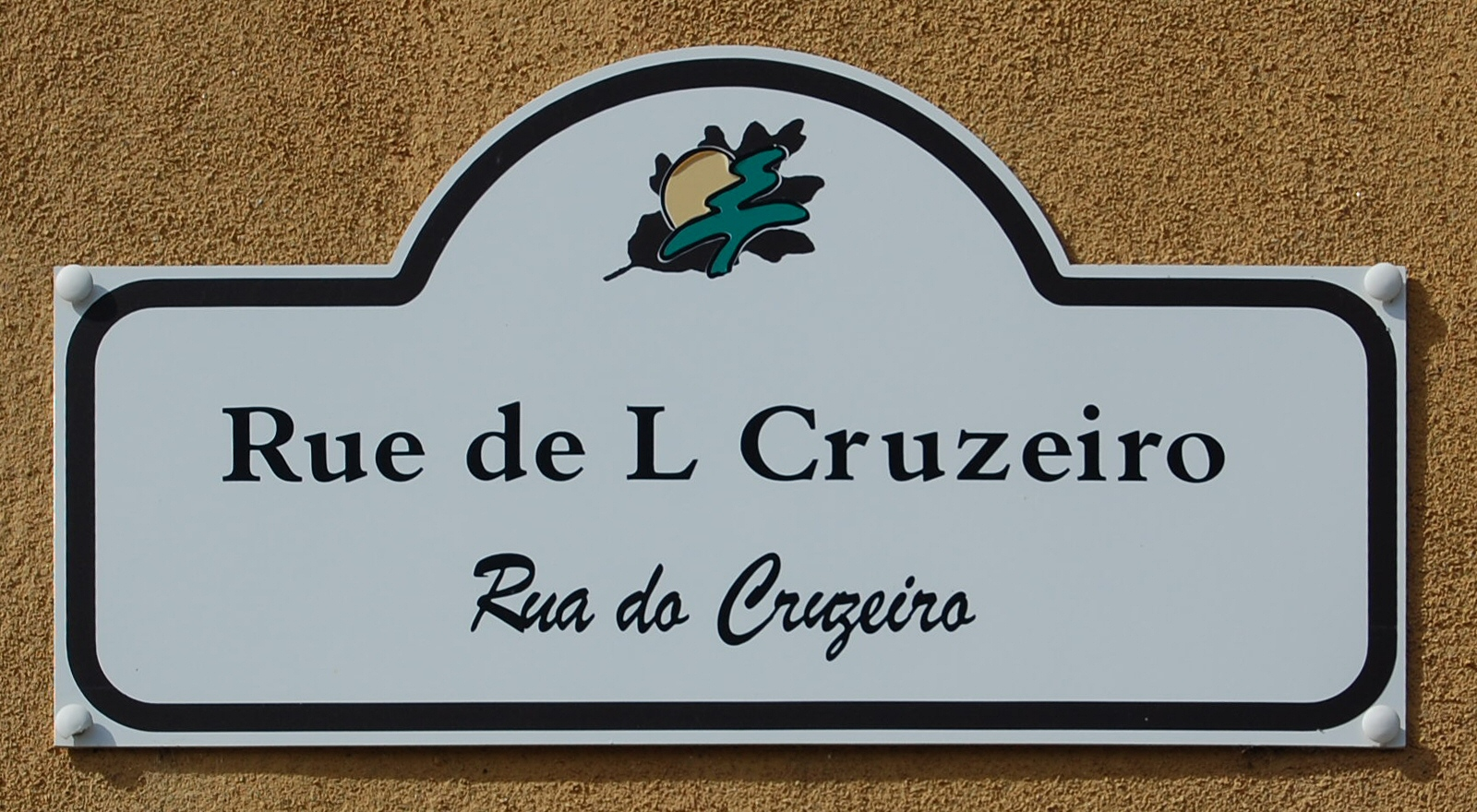 Placa de identificação de rua em mirandês na aldeia de Genísio (Miranda do Douro, Portugal.)